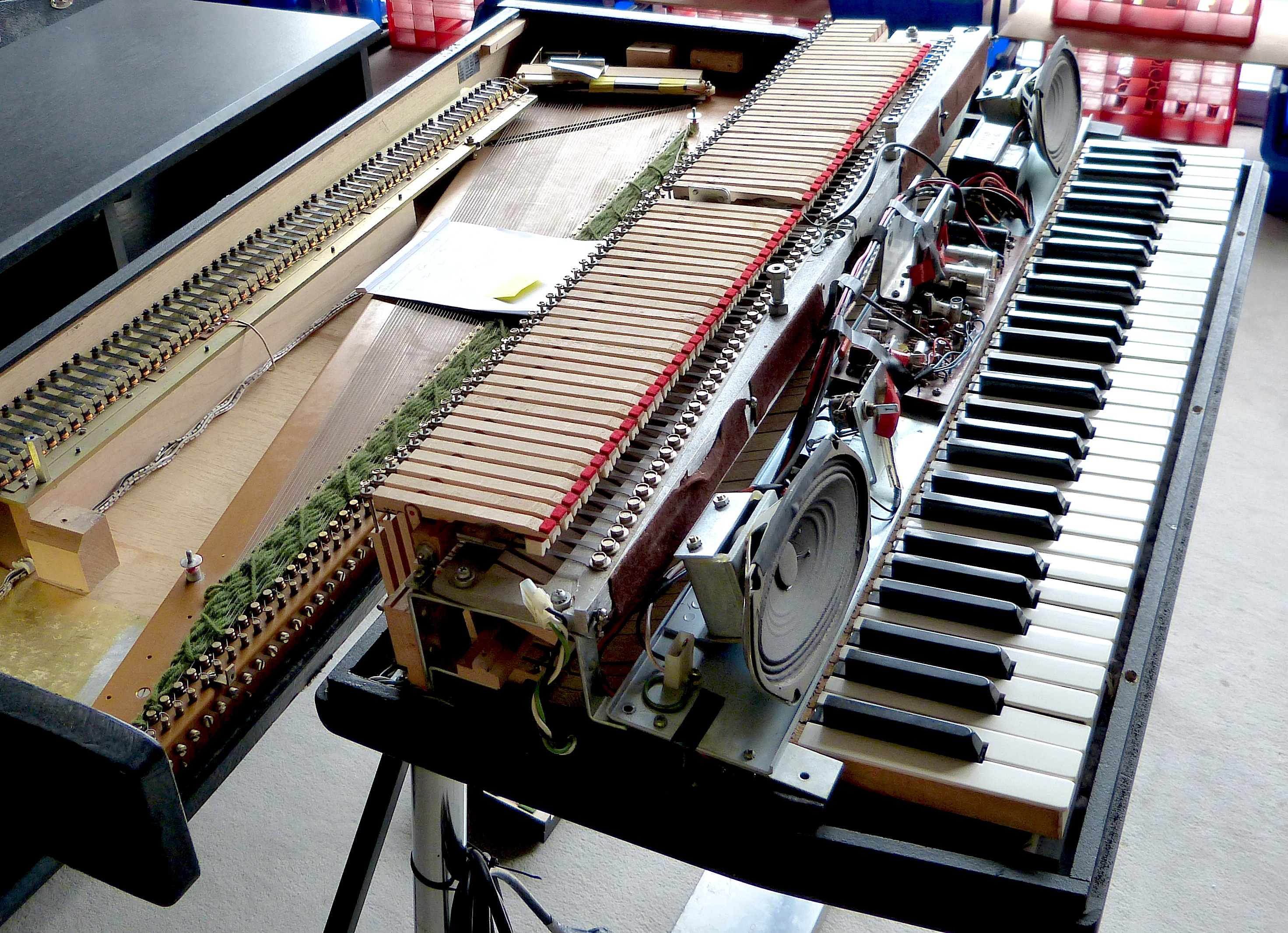 Blick in eine der Museumswerkstätten